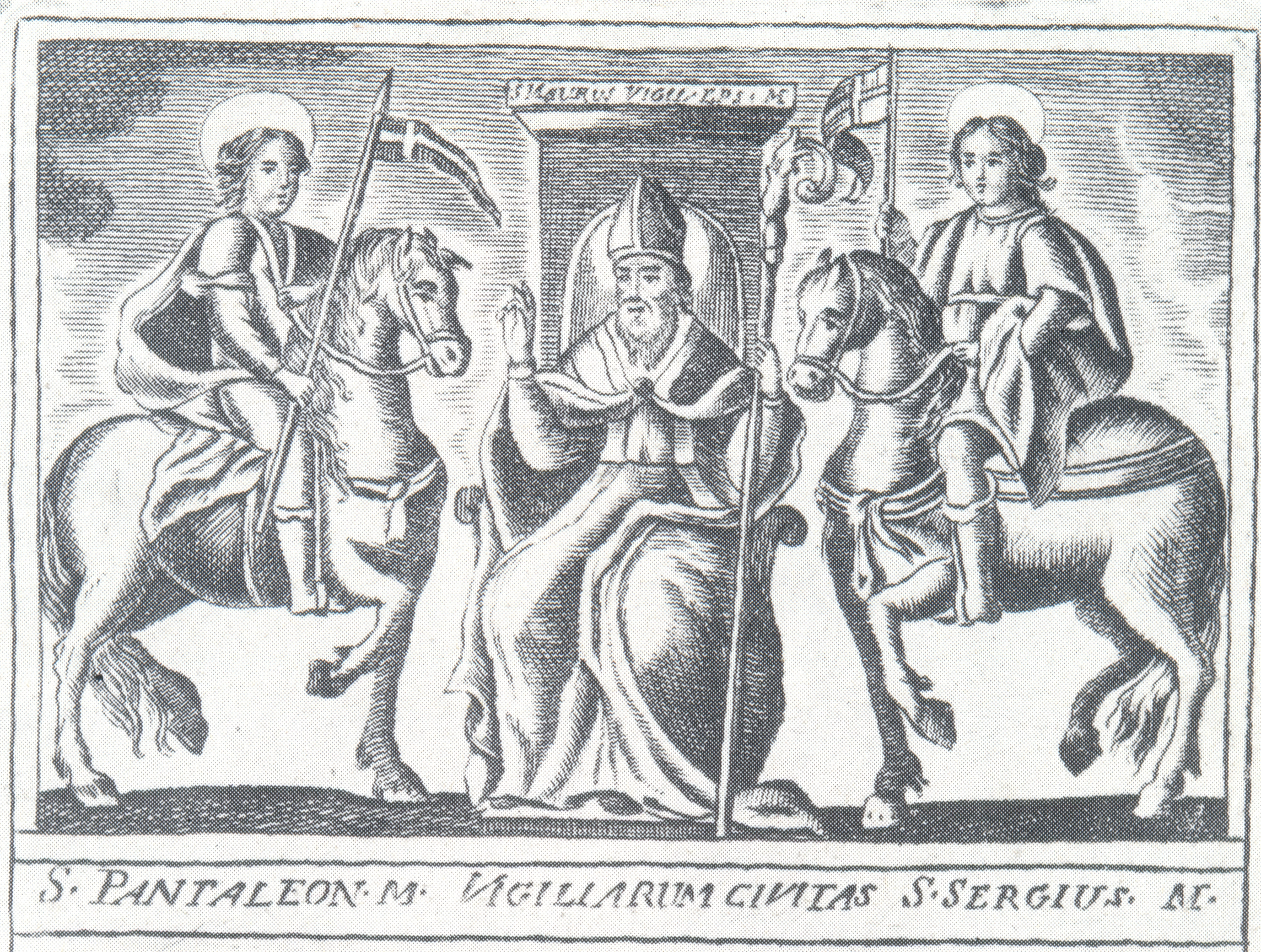 Antica icona dei tre Santi protettori di Bisceglie. S. Pantaleone (sinistra), S. Mauro (centro), e S. Sergio (destra).